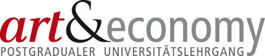 Logo des postgradualen Universitätslehrgangs Art & Economy